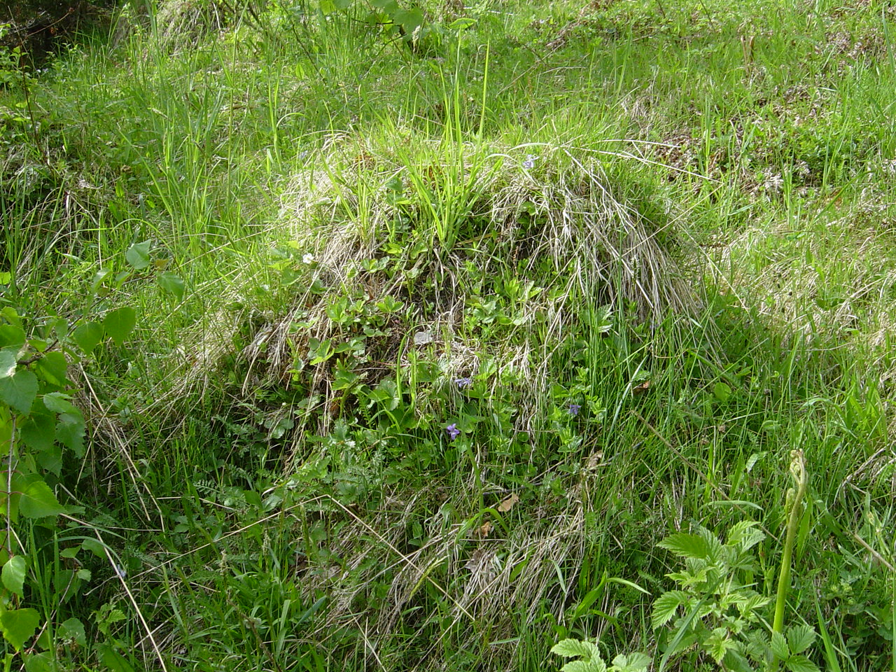 A ant hill - Lasius flavus